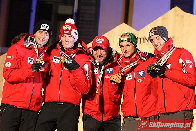 Dekoracja medalowa konkursu drużynowego mężczyzn na skoczni K-120